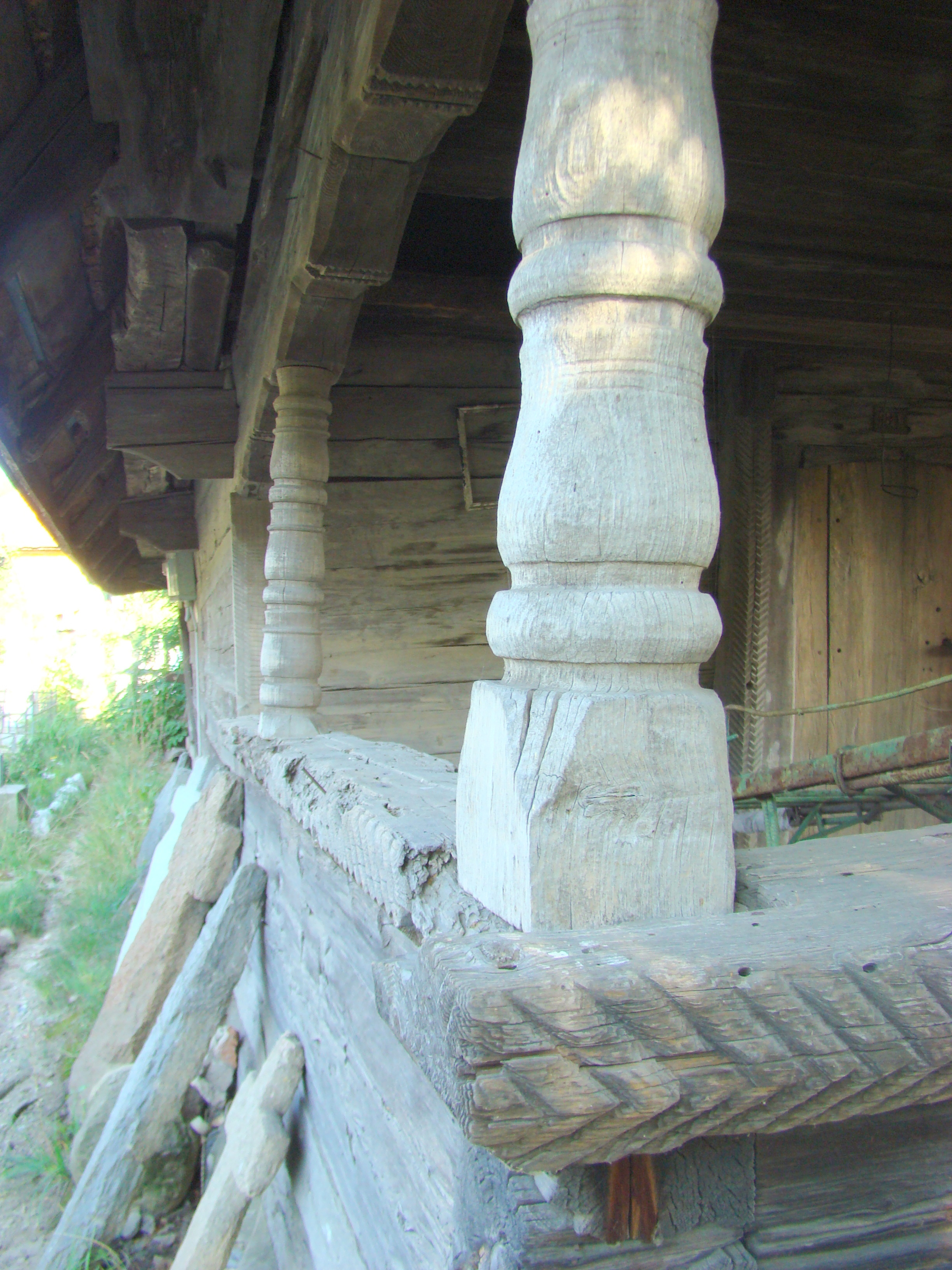 Biserica de lemn „Adormirea Maicii Domnului”, sat Curpen; comuna Stănești